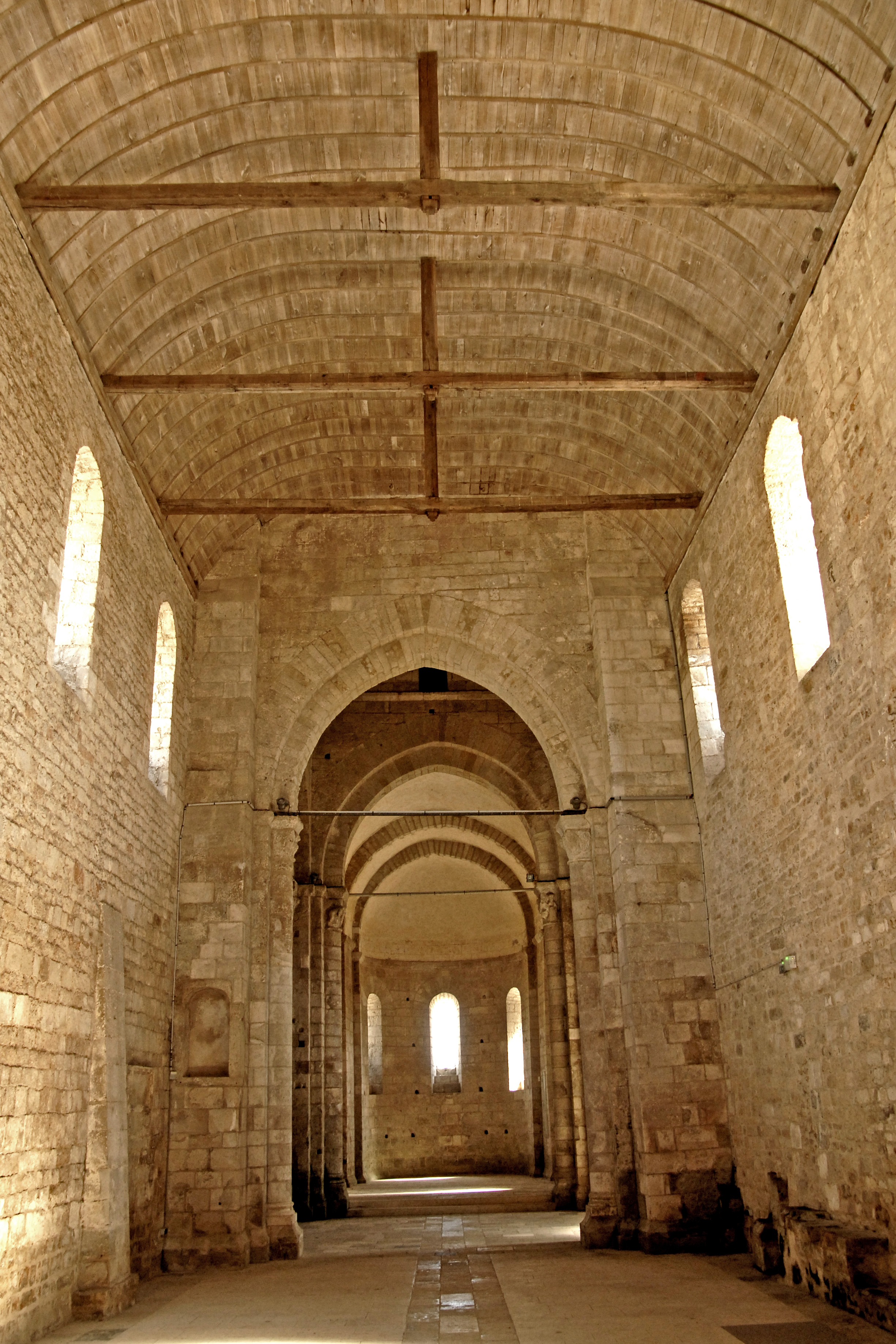 Melle, St.-Savinien, Schiff